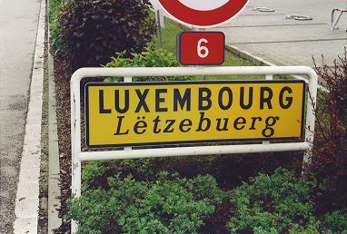 Ortsschild von Luxemburg